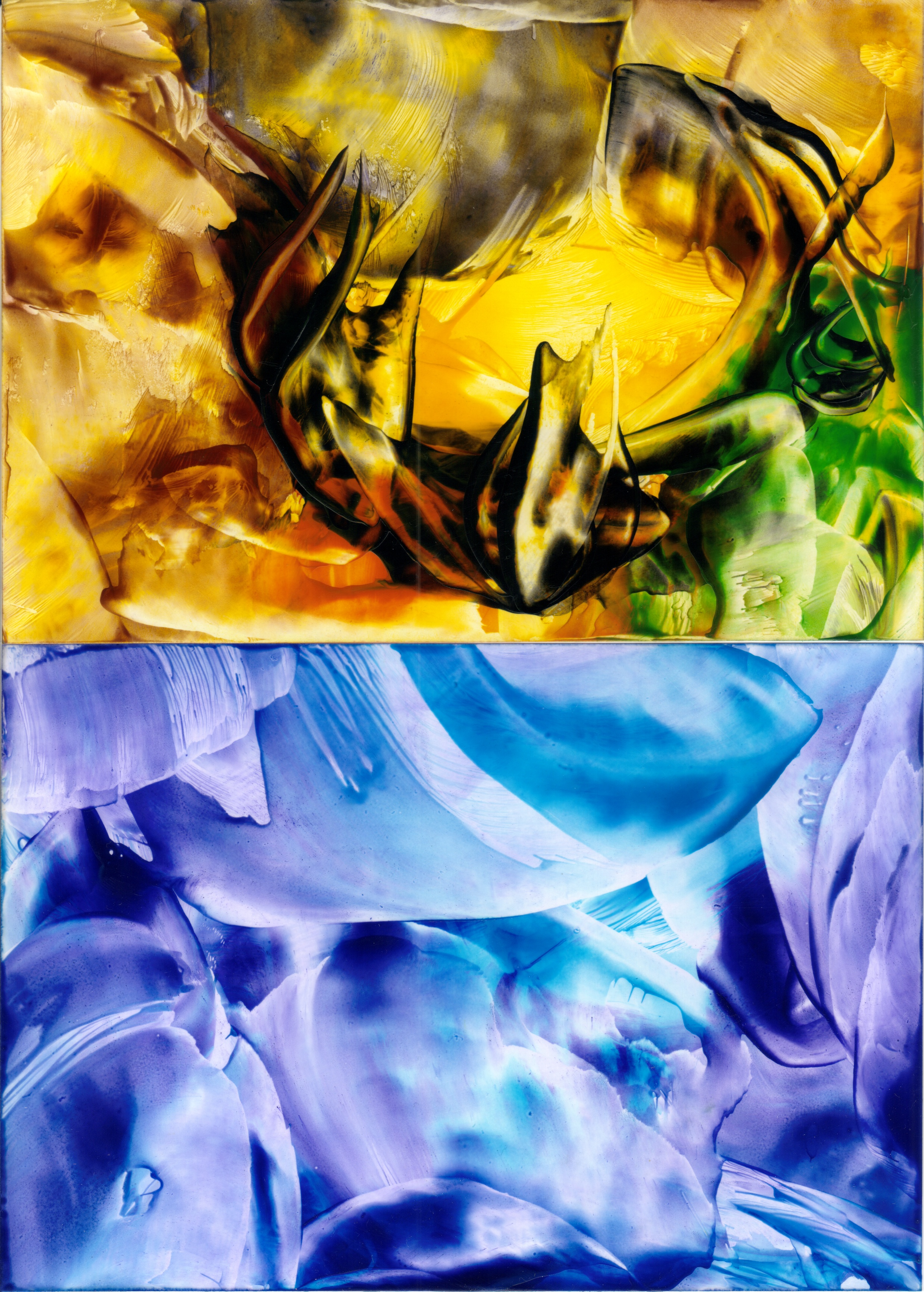 Diese Enkaustik-Arbeiten sind vom 31.12.2006. Sie haben im Original die Größe DIN A 5 und wurden mit einem einfachen Scanner digitalisiert. Bei den Bildern habe ich mit Farbverläufen experimentiert. Es wurden ausschließlich die groben Werkzeuge Maleisen und Heißluftpistole verwendet.